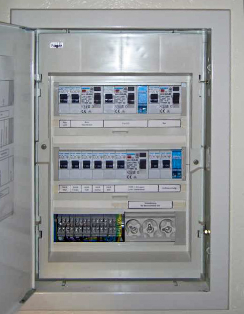 Unterverteilung mit Leitungsschutzschaltern, FI-Schutzschaltern, Stromstoßschaltern, Reihenklemmen und Neozed-Sicherungen